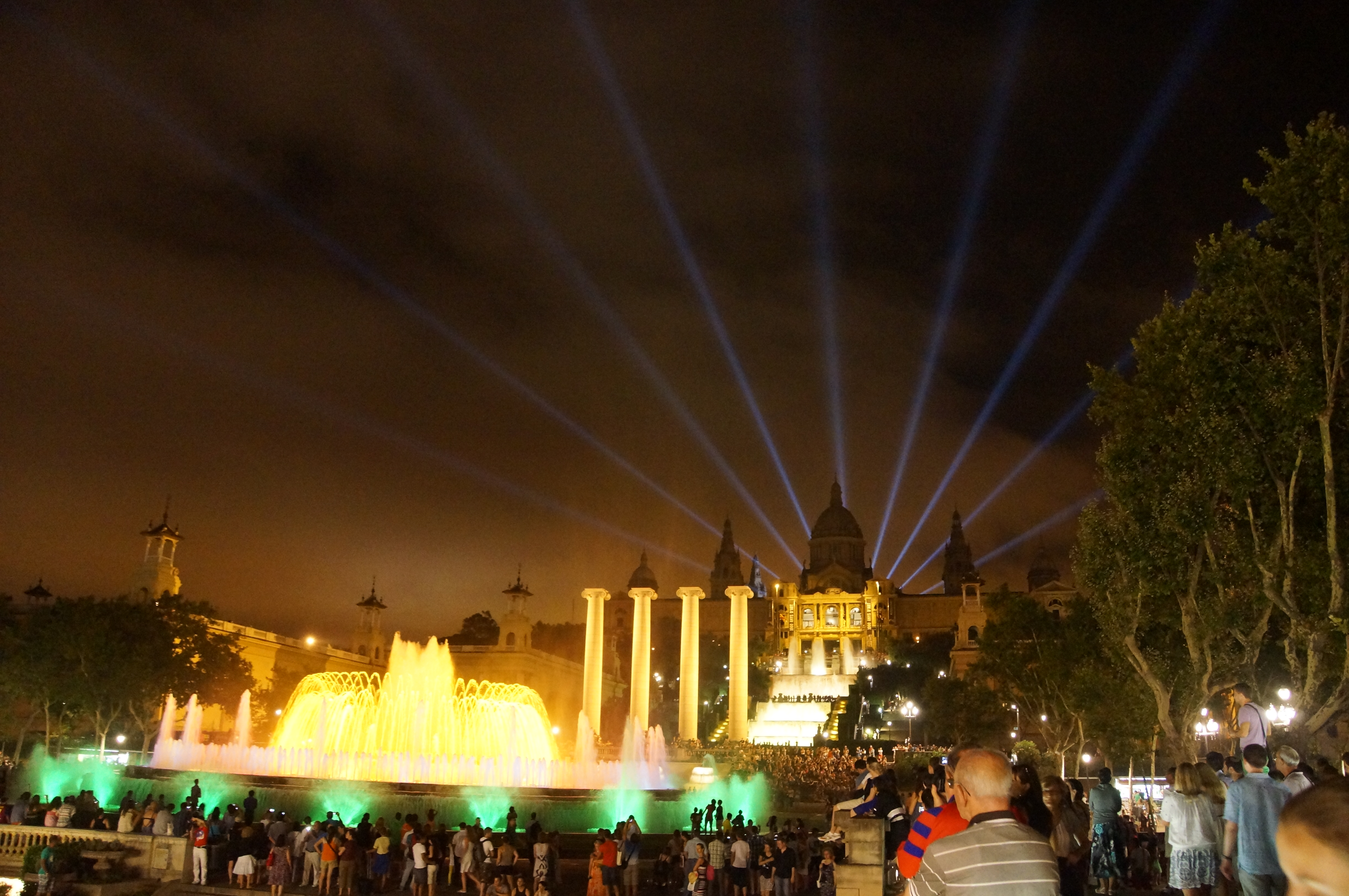 Font Màgica (Barcelona)